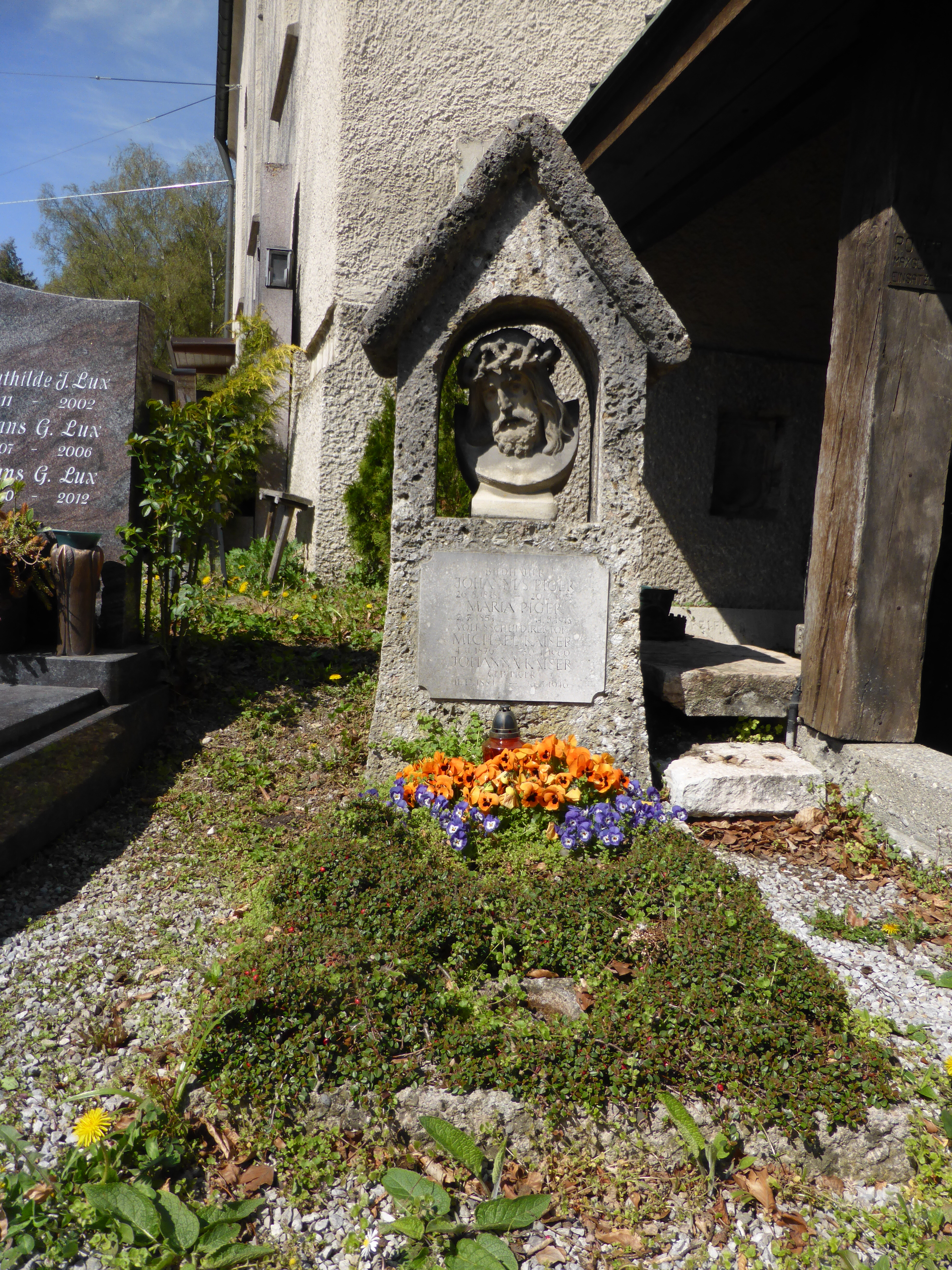 Von Johann Piger selbst gestaltete Grabstätte, Friedhof Salzburg-Maxglan